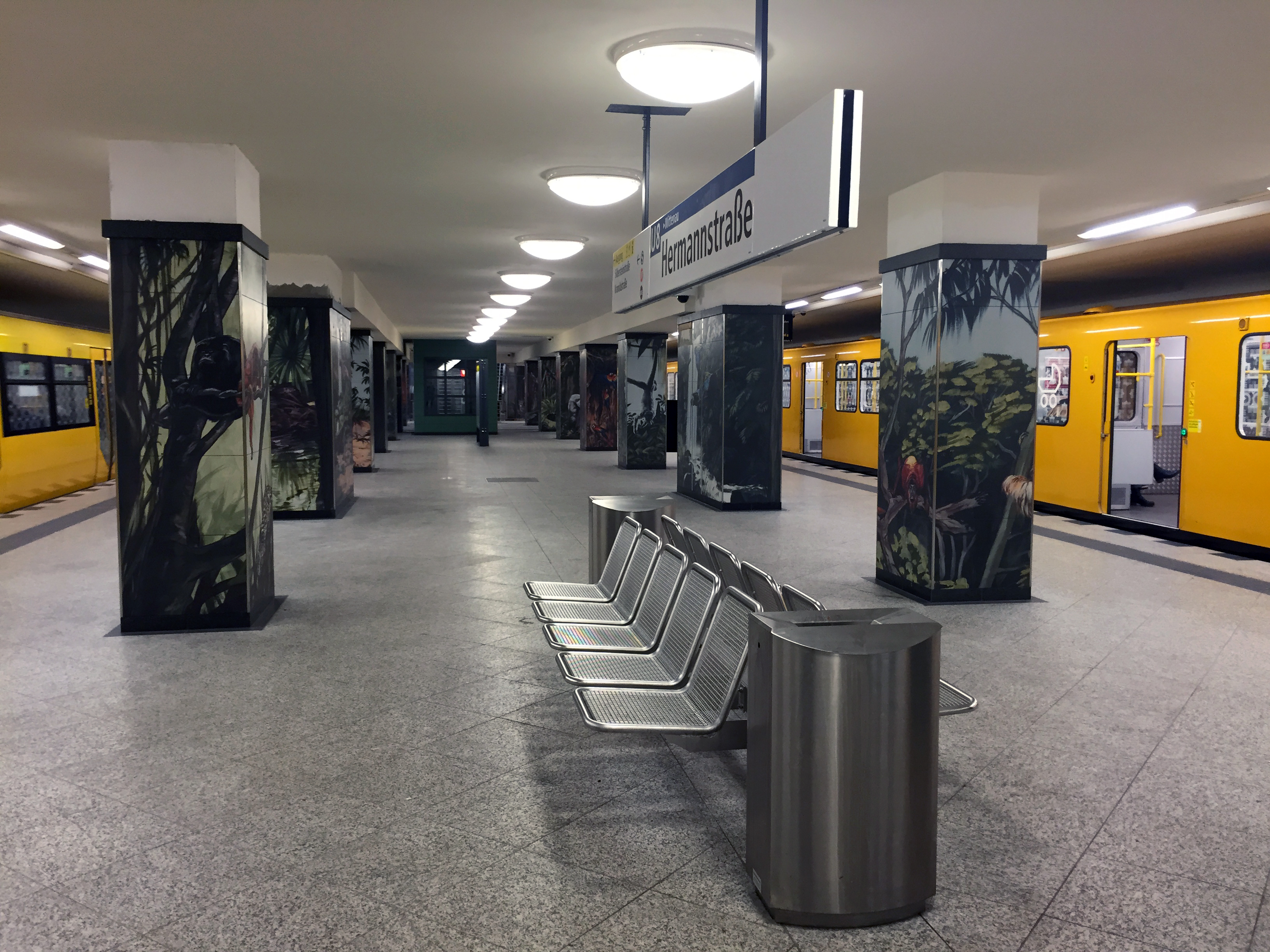 U-Bahnhof der Linie U8, Hermannstraße nach der Sanierung. Bild zeigt den Bahnhof im neuen Motto "Großstadtdschungel".